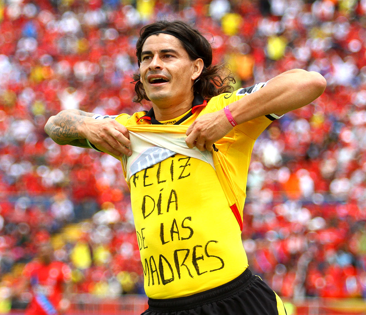 NACIONAL VS BARCELONA 2 LAC - Ismael Blanco